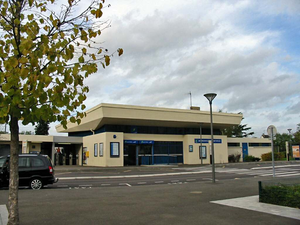 La gare d'Aubergenville-Élisabethville (yvelines) Photo JH Mora, novembre 2005 Licensing Catégorie:Image d'Aubergenville Aubergenville